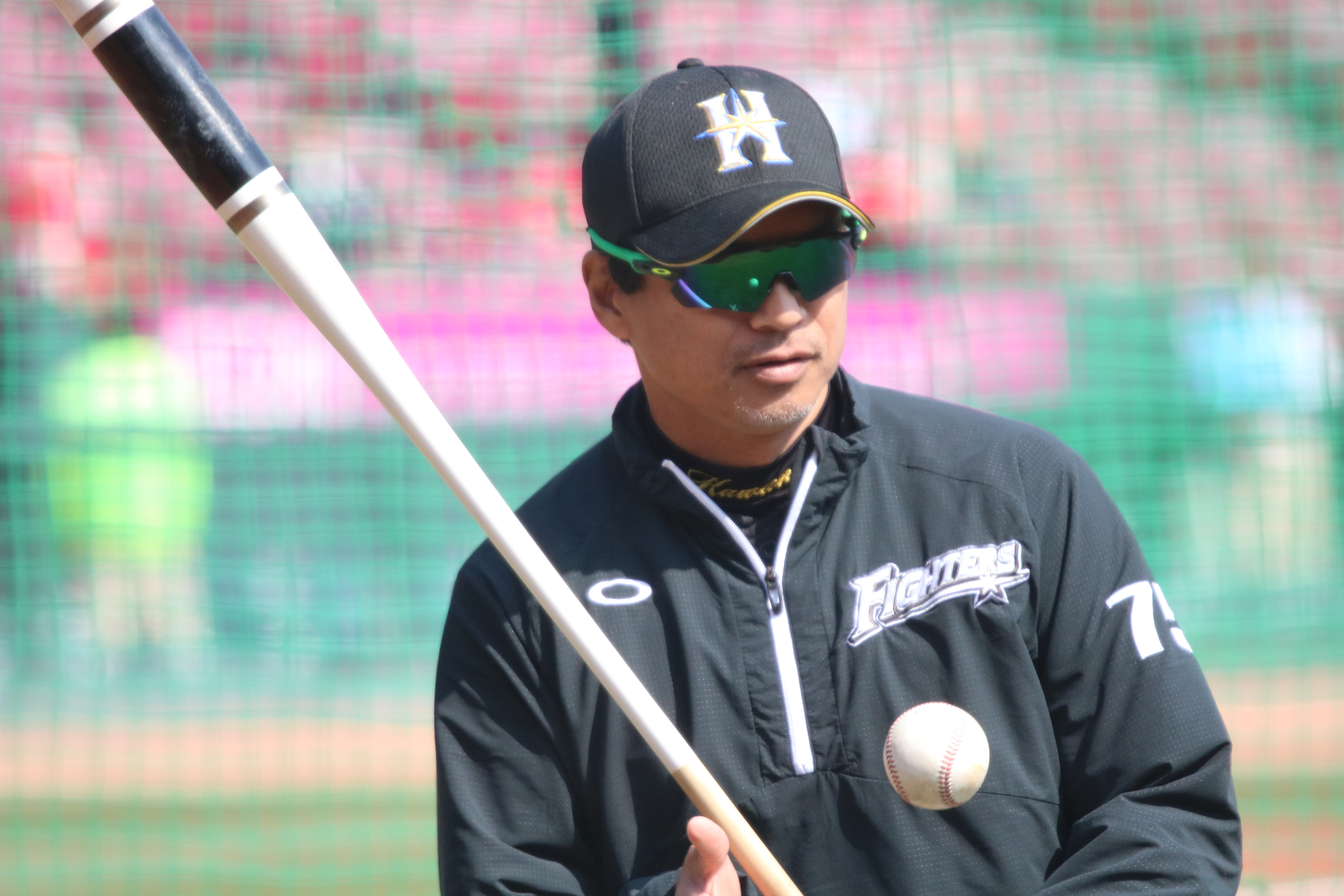 2018/3/13 マツダスタジアム